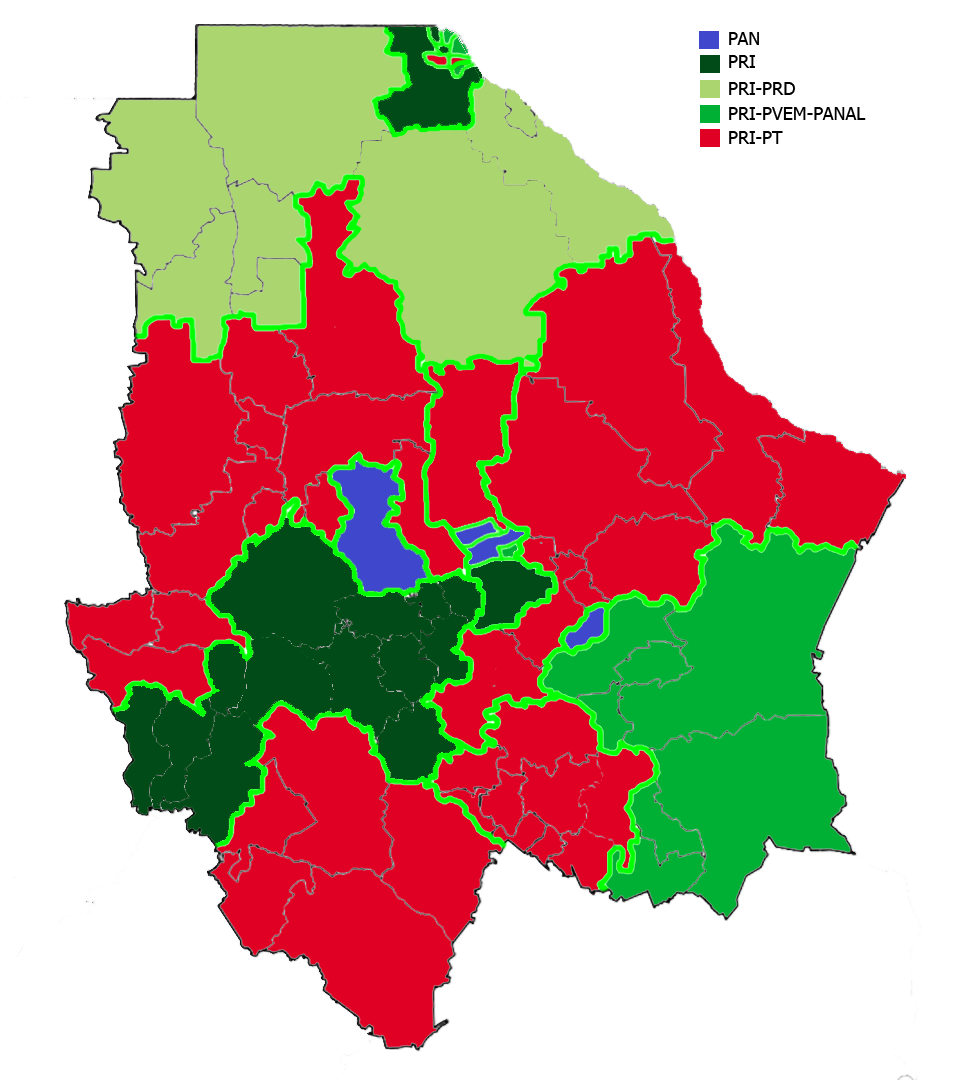 Diputados locales electos en el Estado de Chihuahua en 2013 por partido.